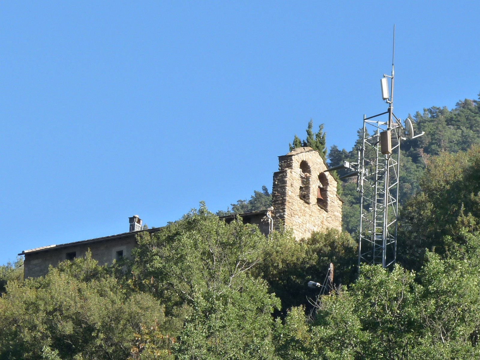 Eglise de Thuès, Pyrénées-Orientales, France